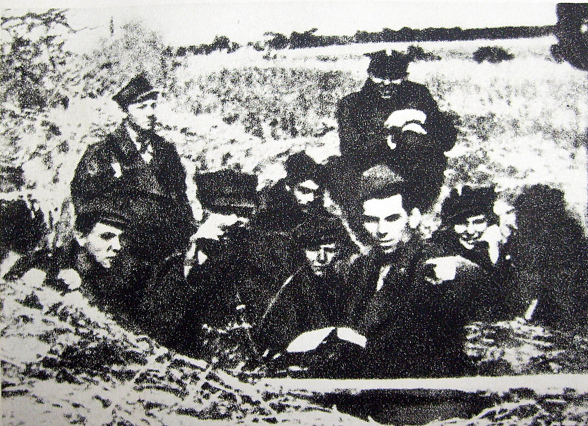 Berlin. Punkt obserwacyjny 11 pułku moździerzy